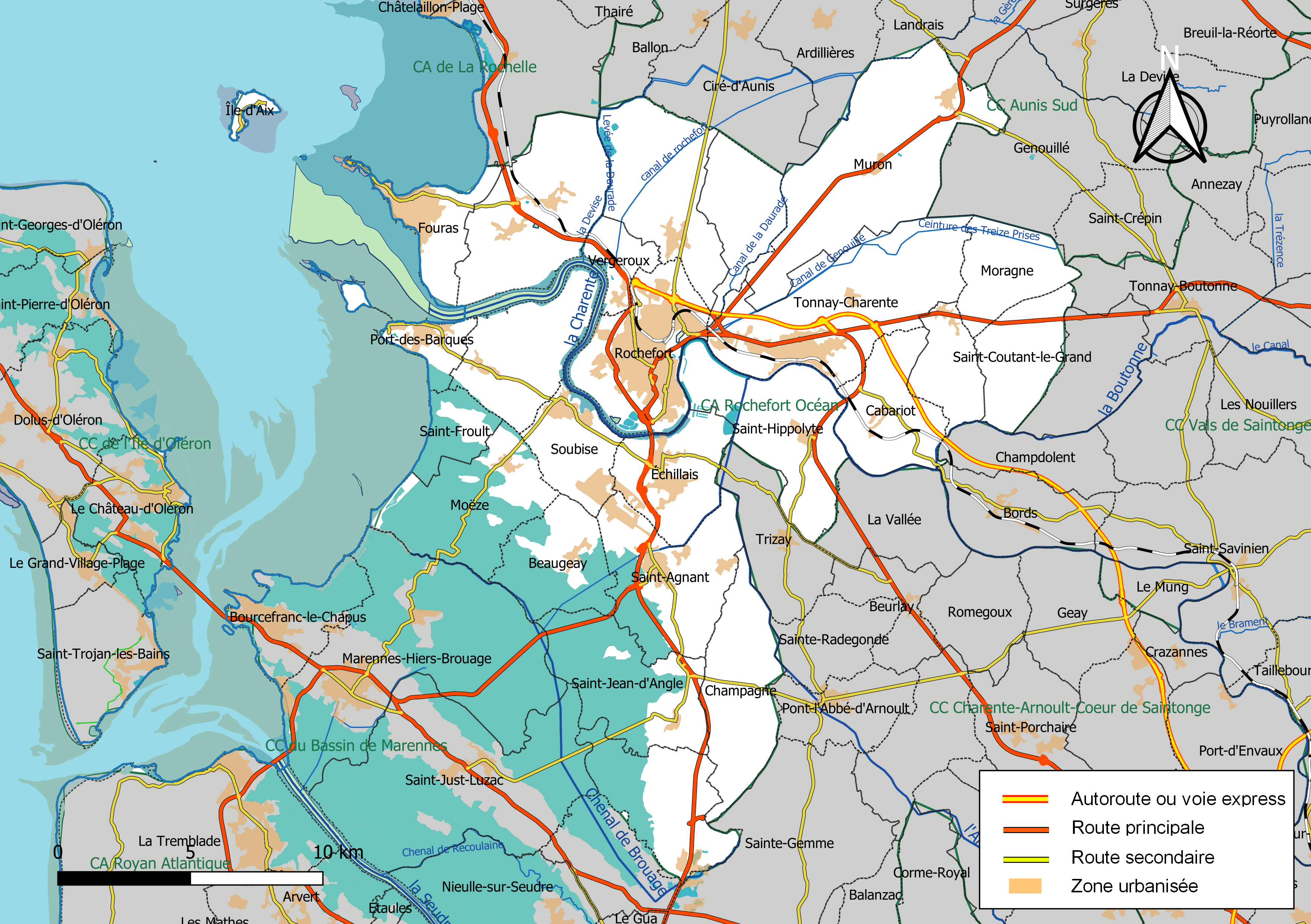 Carte géographique de la Communauté d'agglomération Rochefort Océan, département de la Charente-Maritime, France. Composition au 1er janvier 2019.